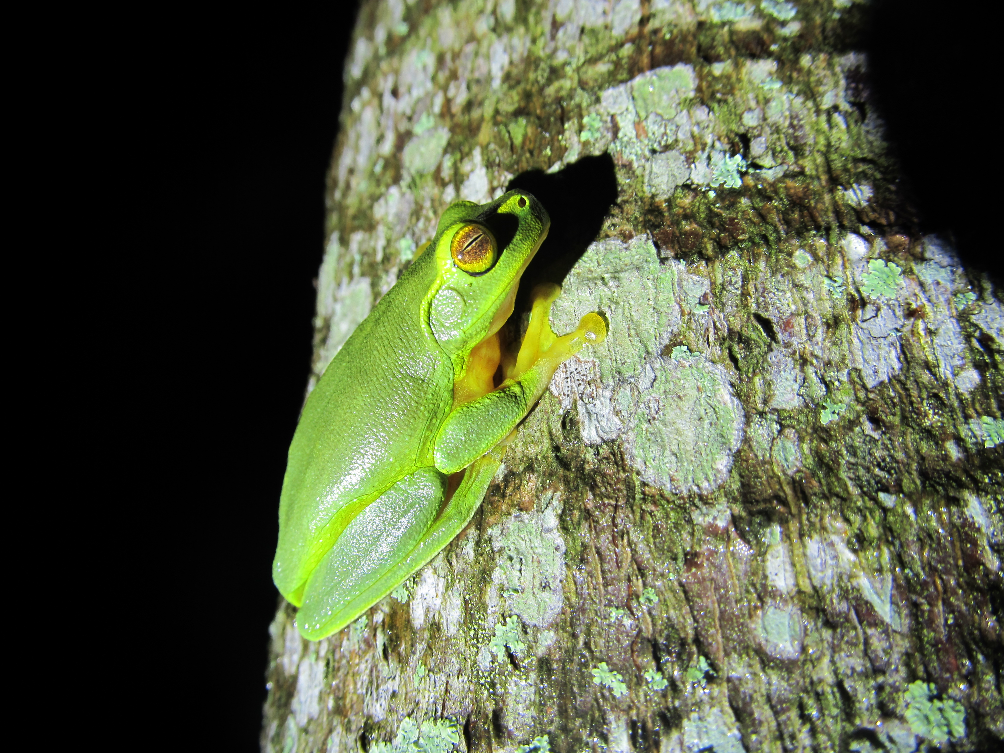 Cairns, QLD